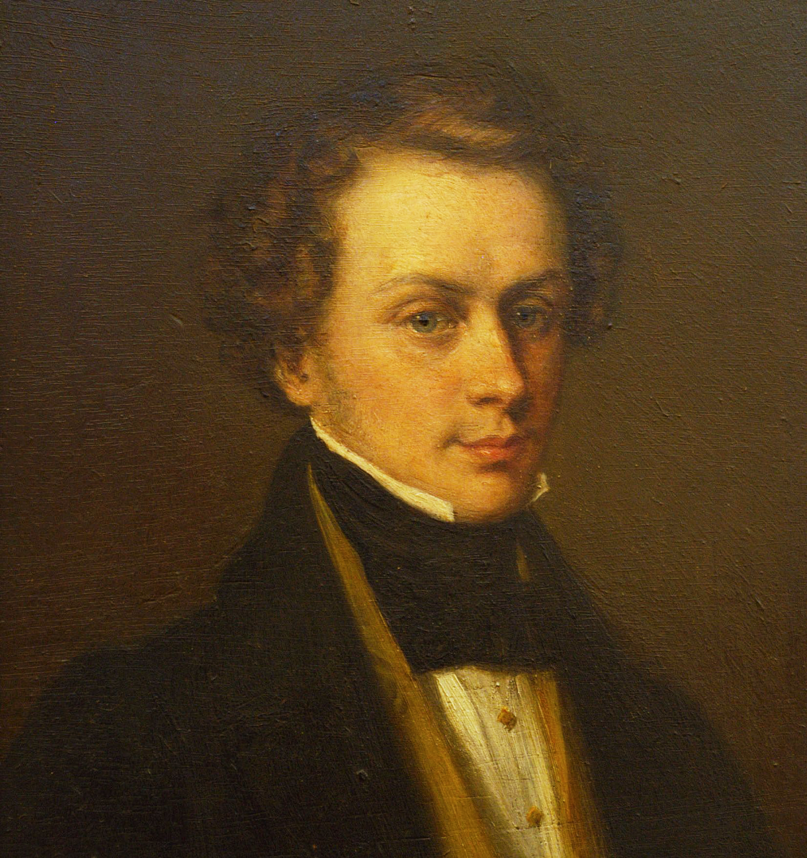 sujet: Christian Doppler licence